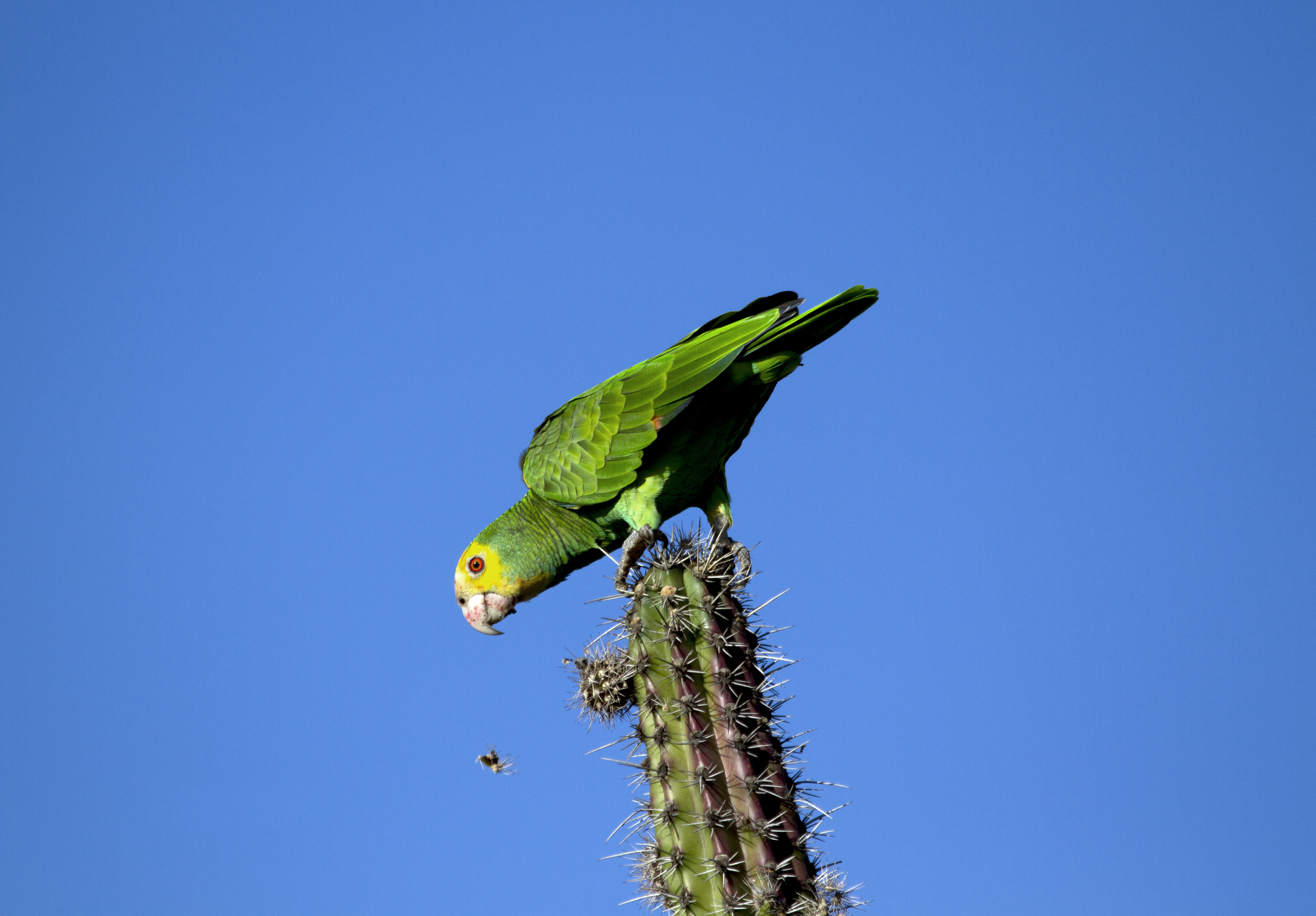 Cotorra Cabeciamarilla Amazona barbadensis. Observada en el Parque Nacional Laguna de la Restinga, Peninsula de Macanao, Estado Nueva Esparta, Venezuela.